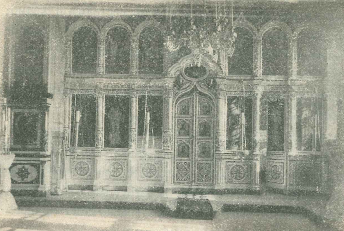 Придельный иконостас Троицкого собора Казанского Головинского монастыря в 1912 году